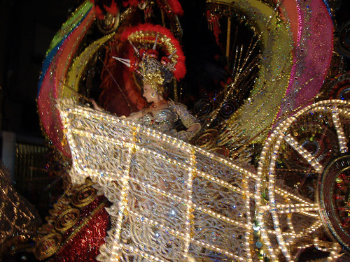 Reina del Carnaval de Santa Cruz de Tenerife 2006. Foto hecha por mi.